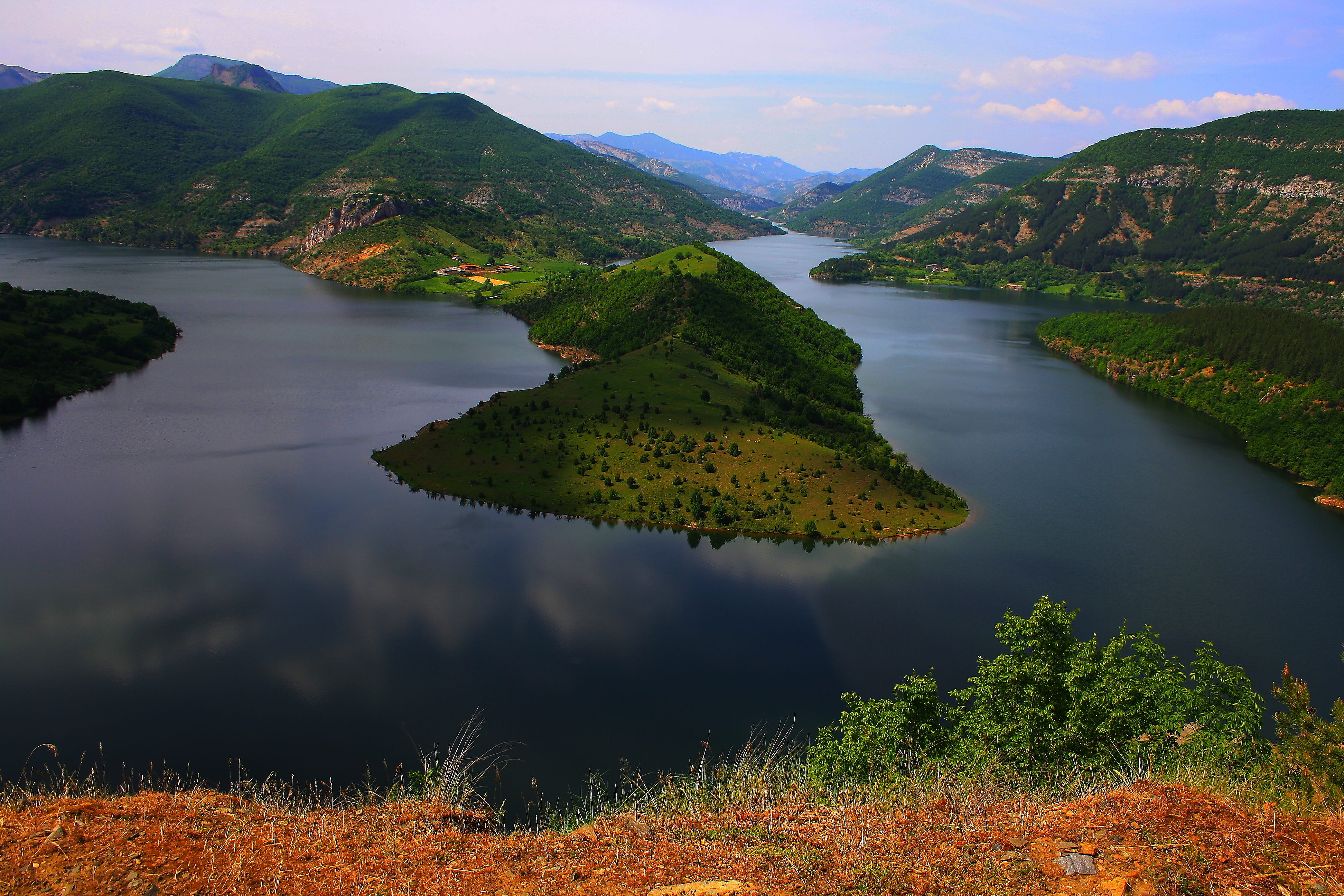 Язовир Кърджали Нулата